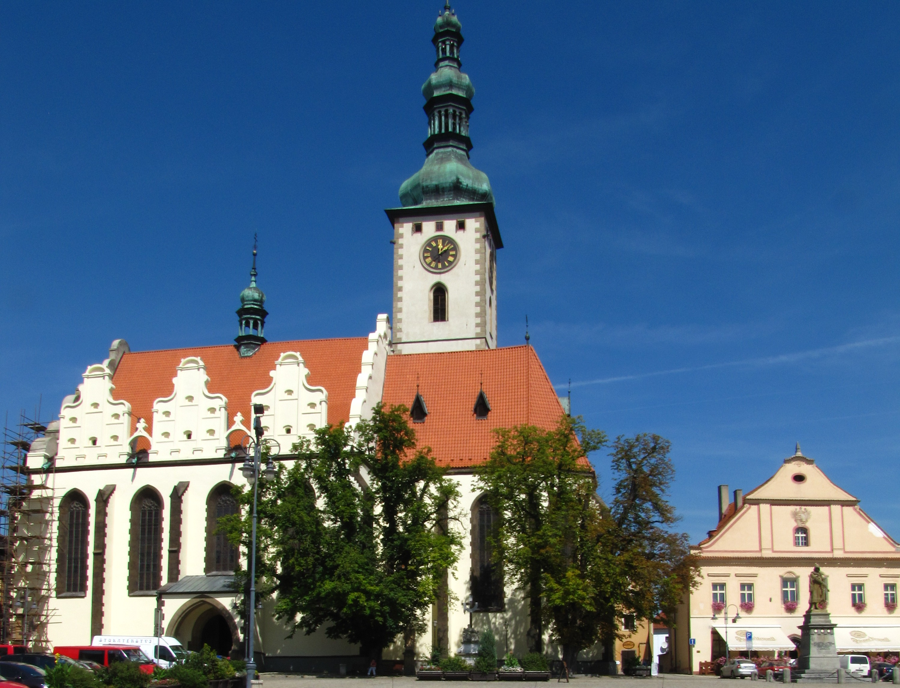 Kostel Proměnění Páně na hoře Tábor (Tábor), nám. Žižkovo, Tábor